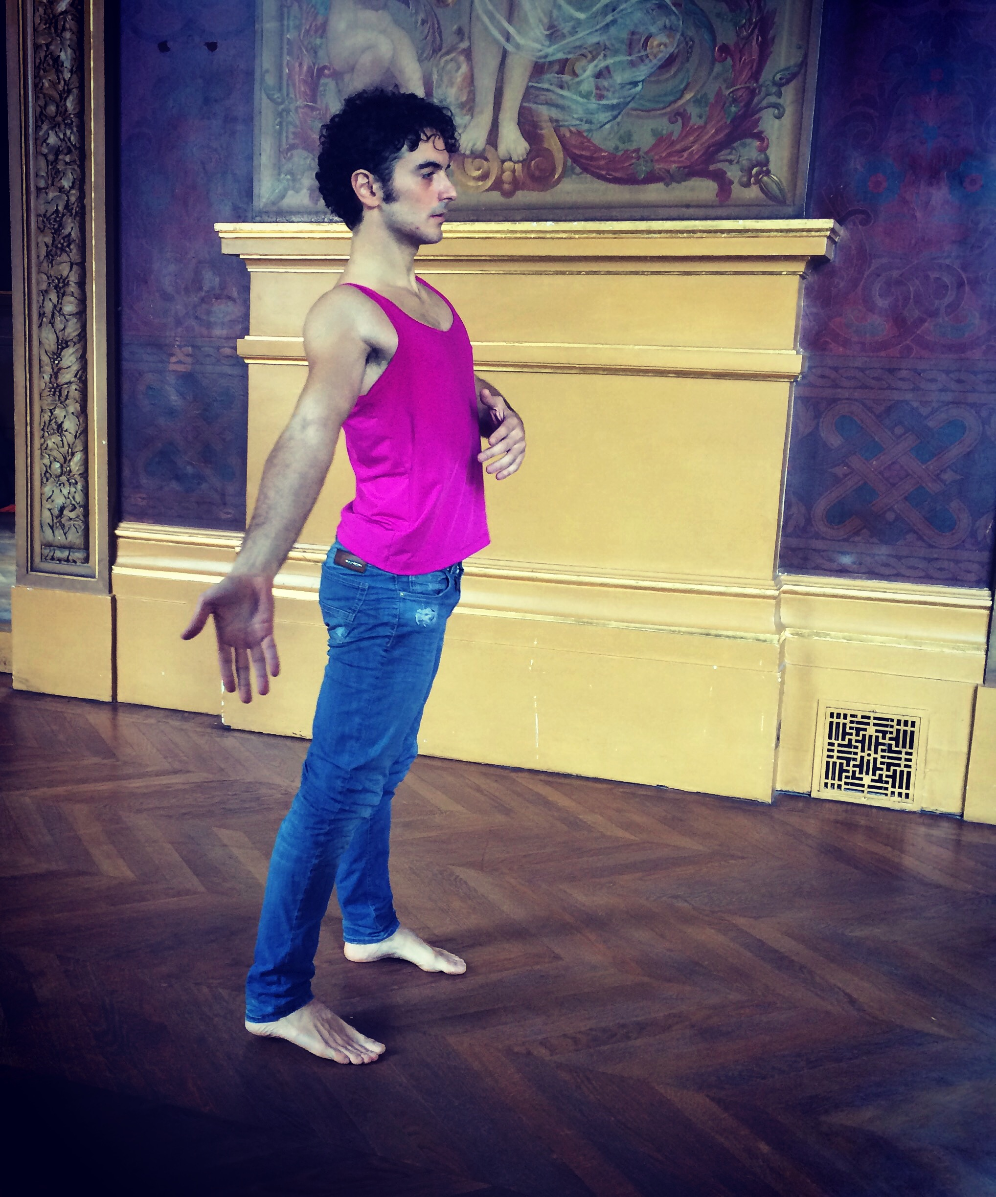 Alessio Carbone pour 20 danseurs pour le 20e siècle Boris Charmatz danse pour le ballet de l'Opéra de Paris